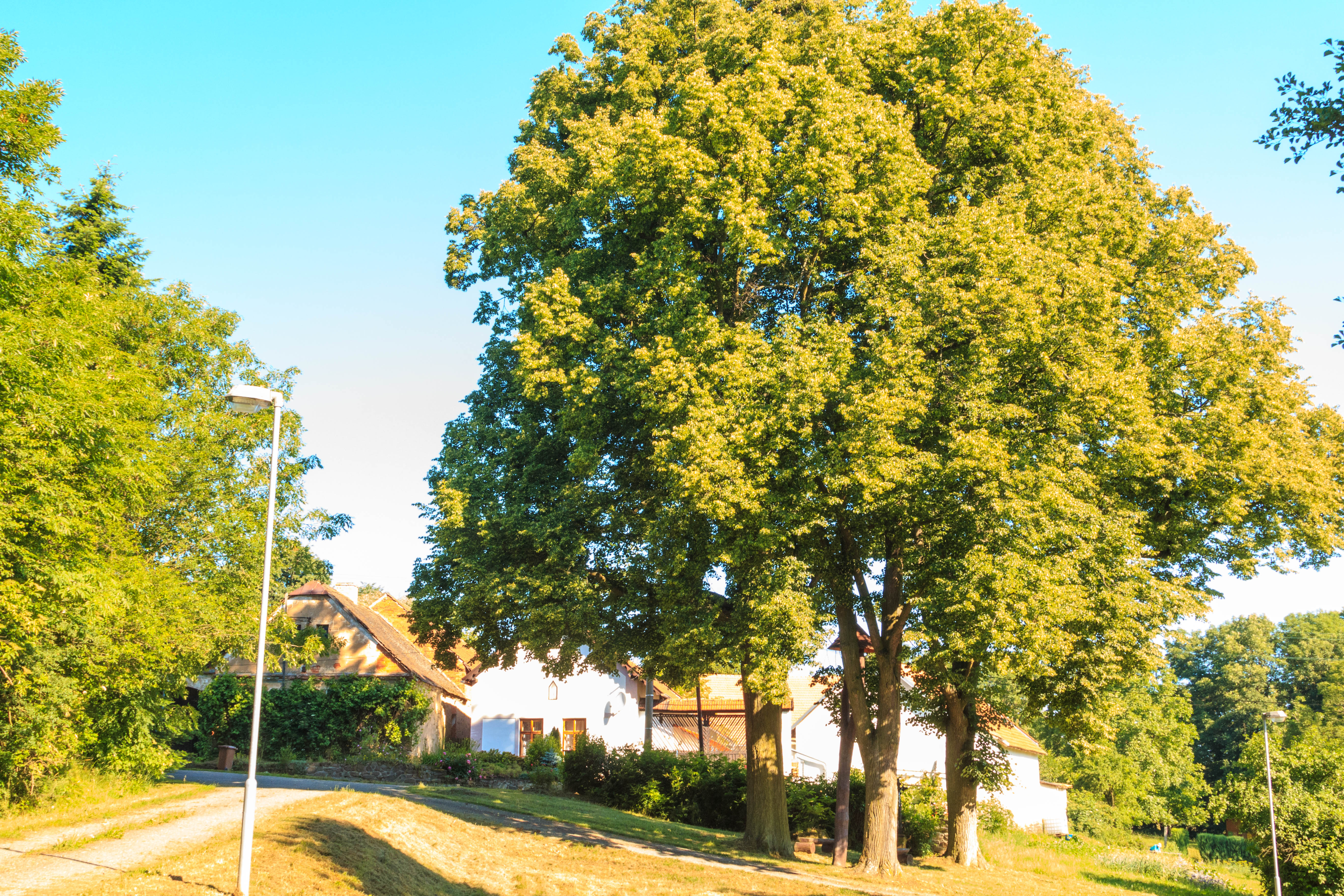 Zhoř u Vilémova čp. 2